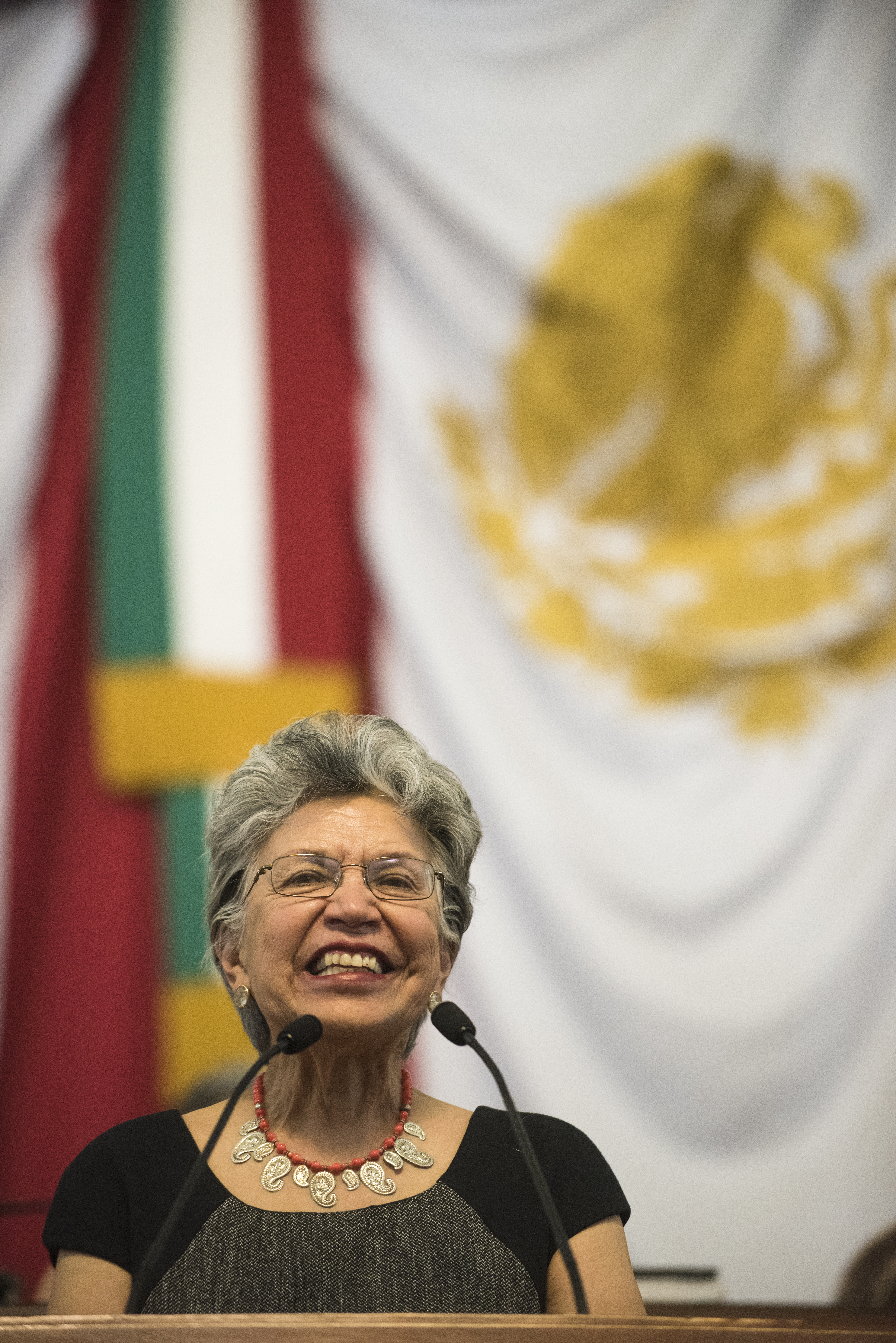 La doctora Silvia Torres Castilleja impartiendo su discurso de aceptación durante la ceremonia en donde se le otorgó la Medalla al Mérito en Ciencias 2015 por su contribución al avance de la Astronomía en México.